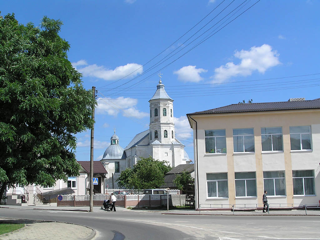 Bernardine Monastery in Slonim (1639-45)